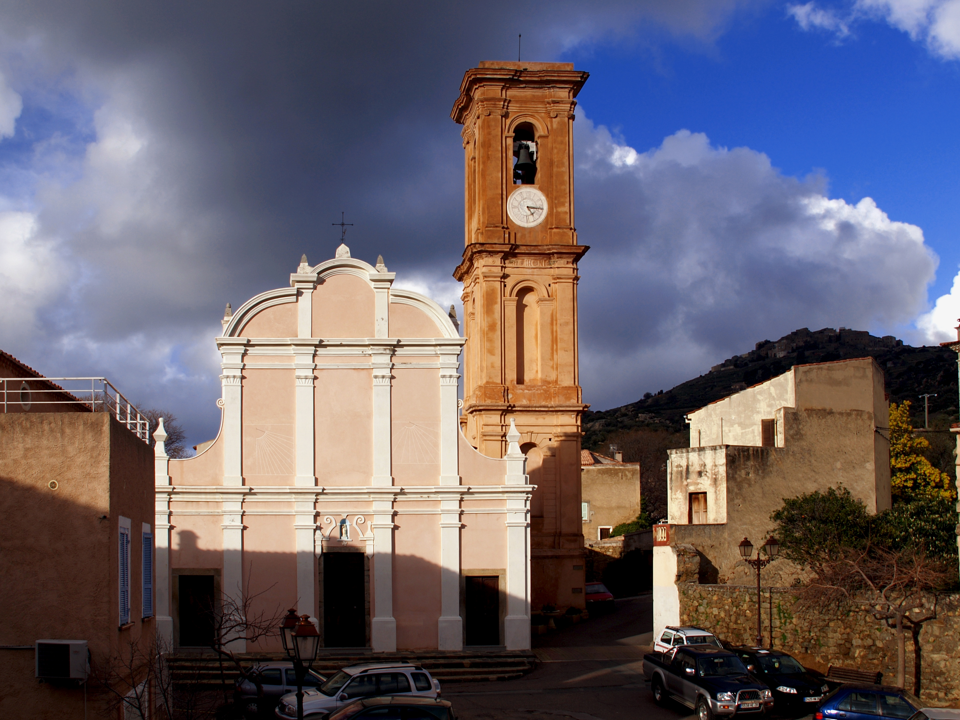 Aregno - Eglise Saint-Antoine